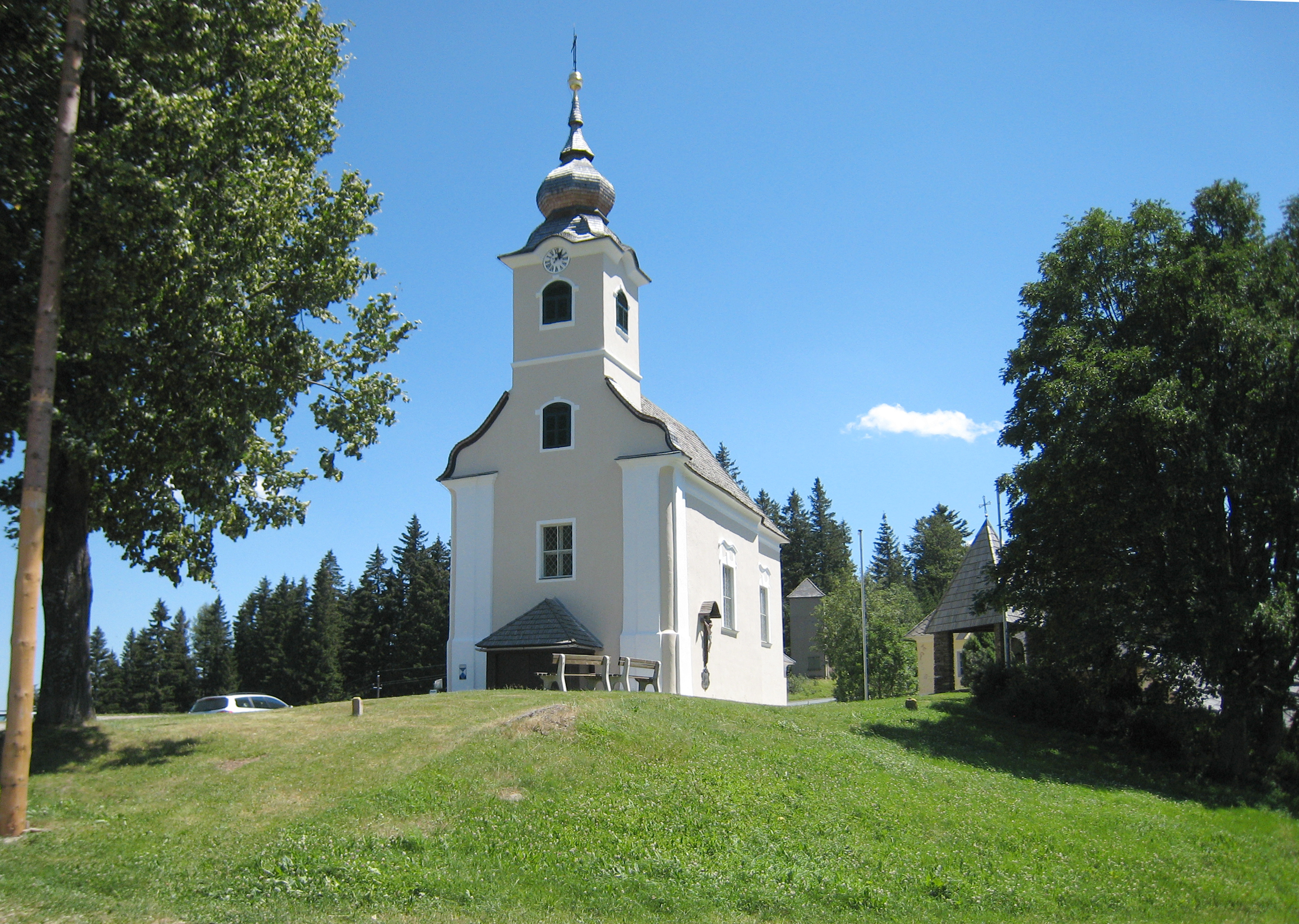 Katholische Pfarrkirche Mariae Namen